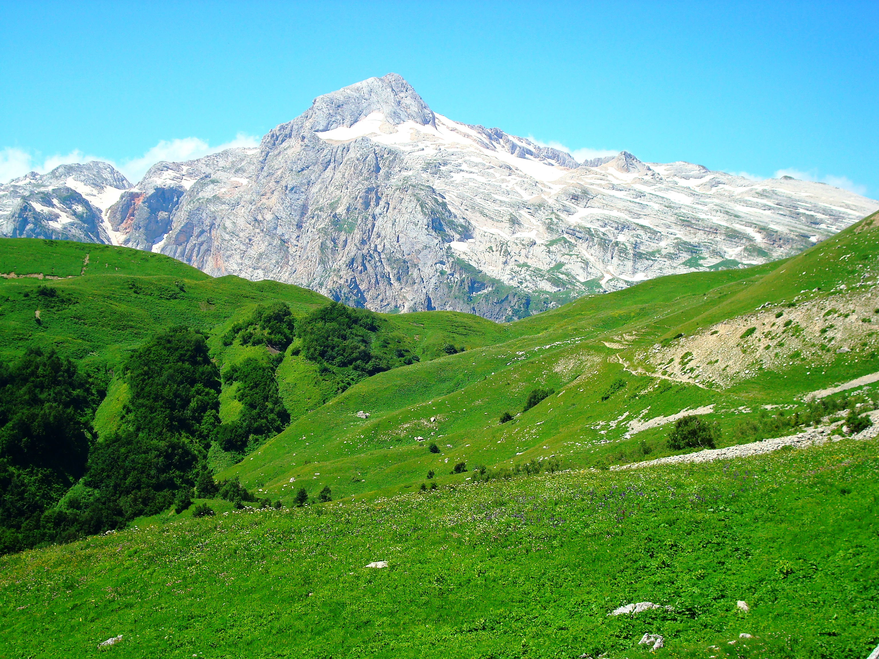 Гора Фишт. Кавказский государственный природный биосферный заповедник, западный отдел. This image is related to the protected area of Russia number 0110050